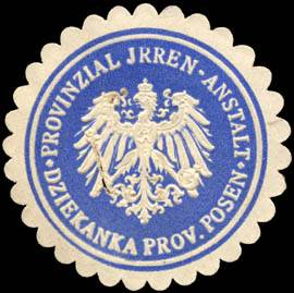 Sealing stamp Title: Provinzial Irren - Anstalt - Dziekanka Provinz Posen Description: blau, weiß, geprägt Place: Dziekanka size: 4 cm